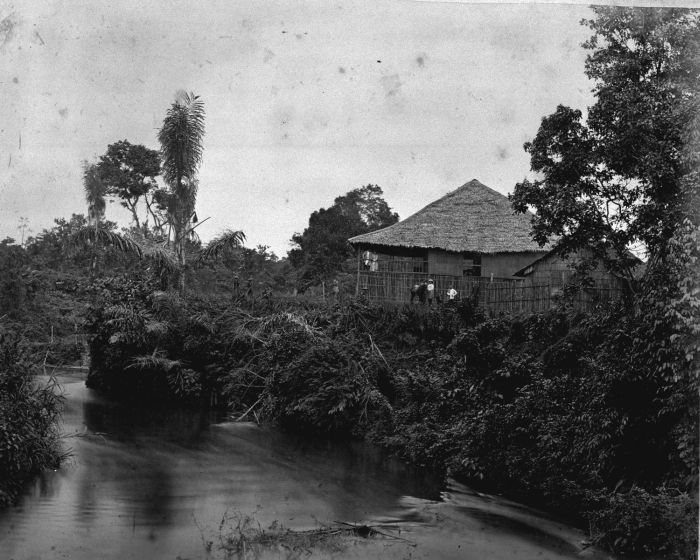 Foto. Het huis van de bij de tabaksonderneming Polonia werkzame planter Michalsky langs de Deli-rivier